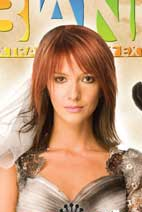 MyBand numarul 2, Anda Adam, Adela Popescu, Andra